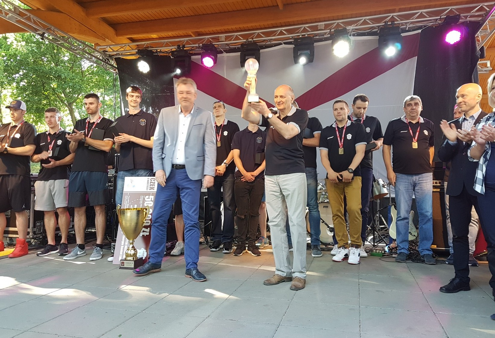 Prezes Spójni Tadeusz Gutowski (19.05.2018)